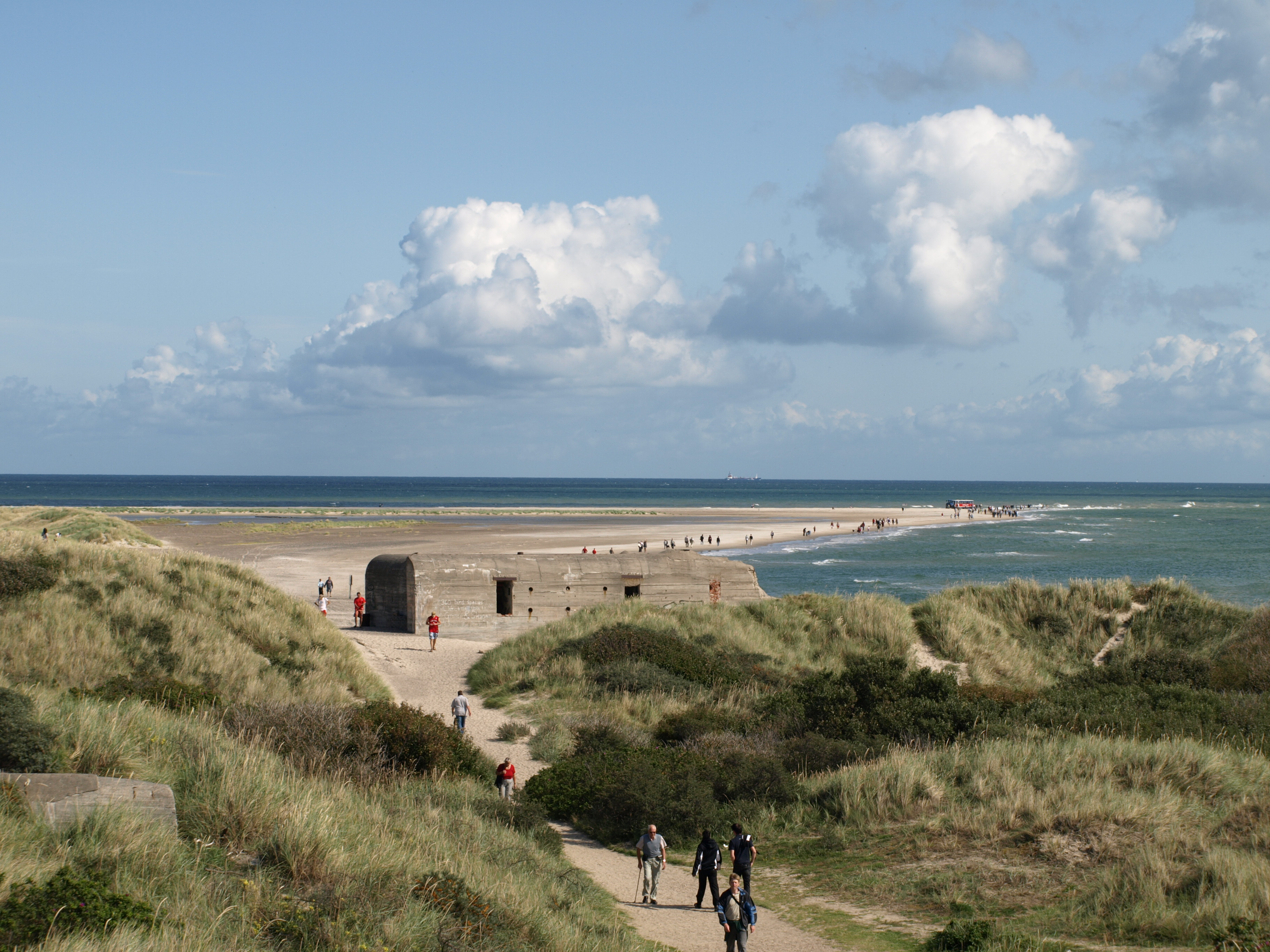 Vista de Greenen